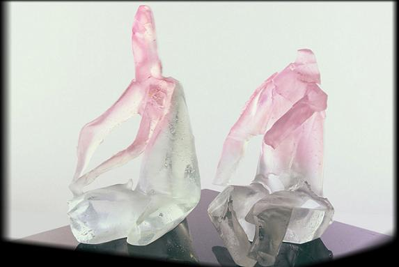 Glass sculpture,cire perdue